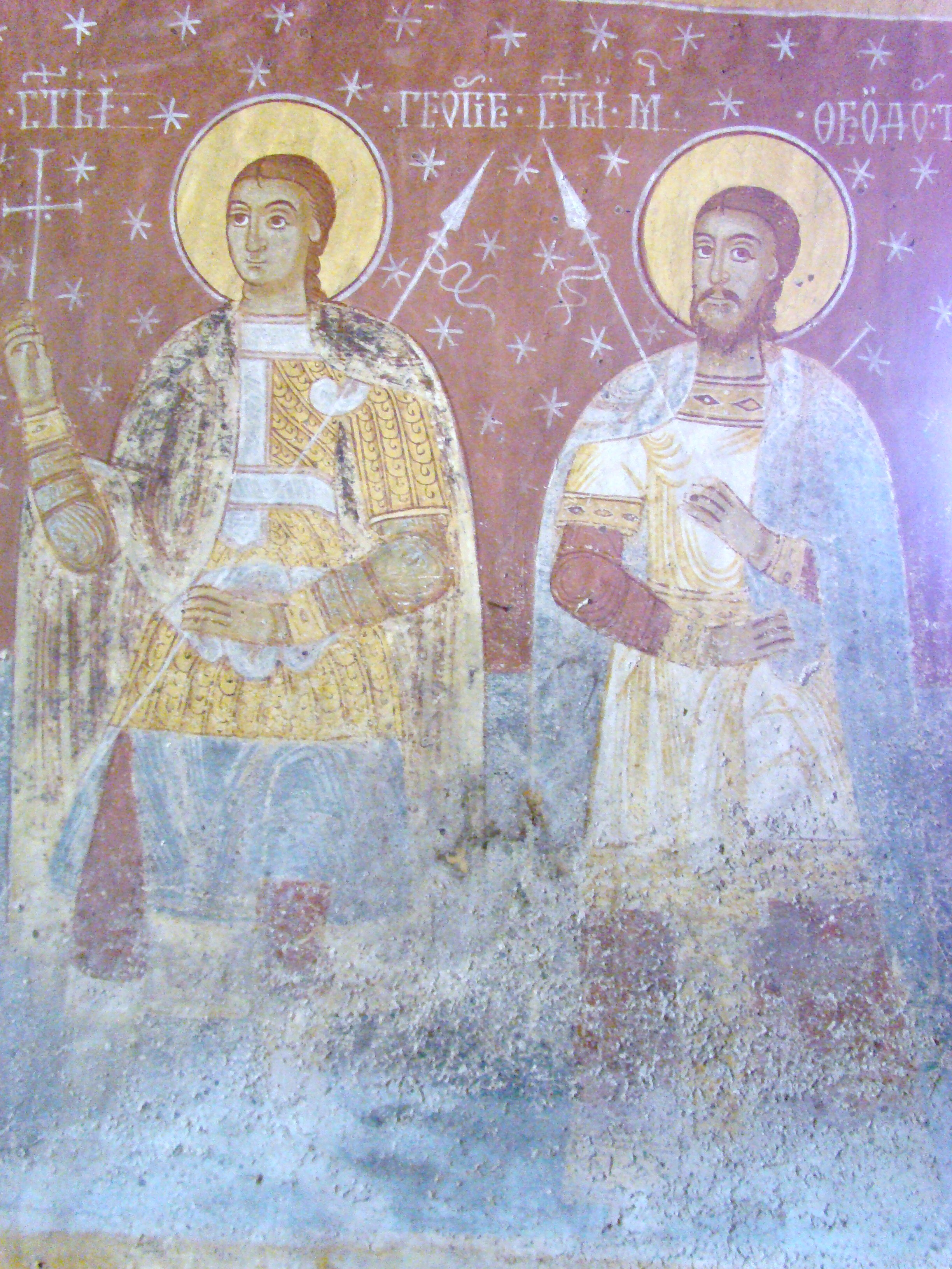 Biserica "Înălţarea Domnului" , sat NUCŞOARA; comuna SĂLAŞU DE SUS